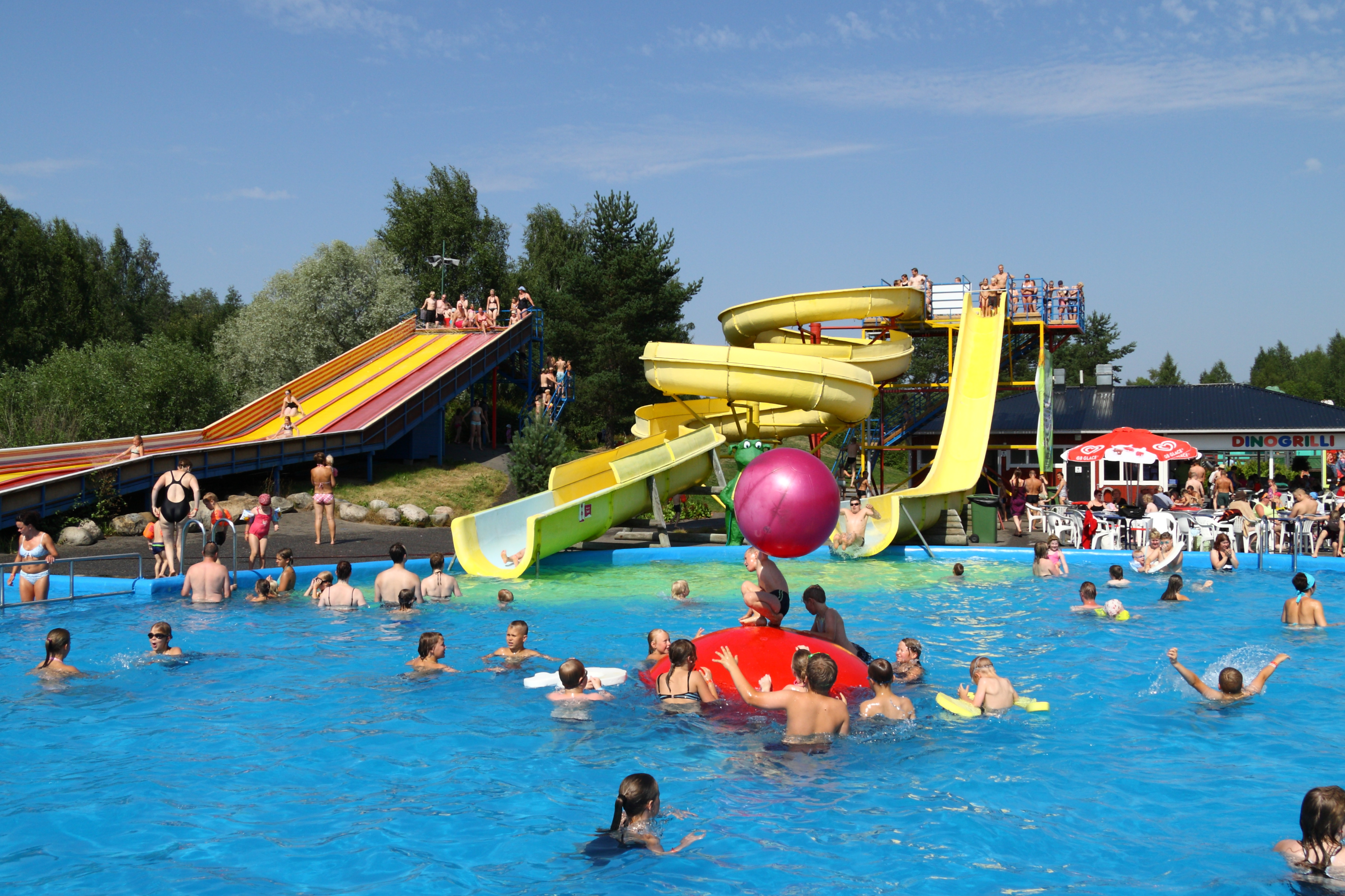 Visulahti / Dinosauria